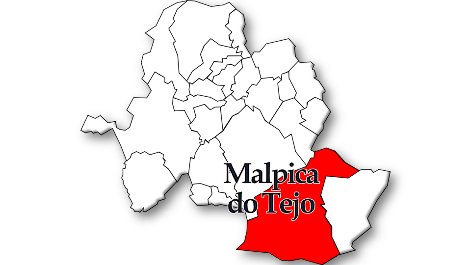 População